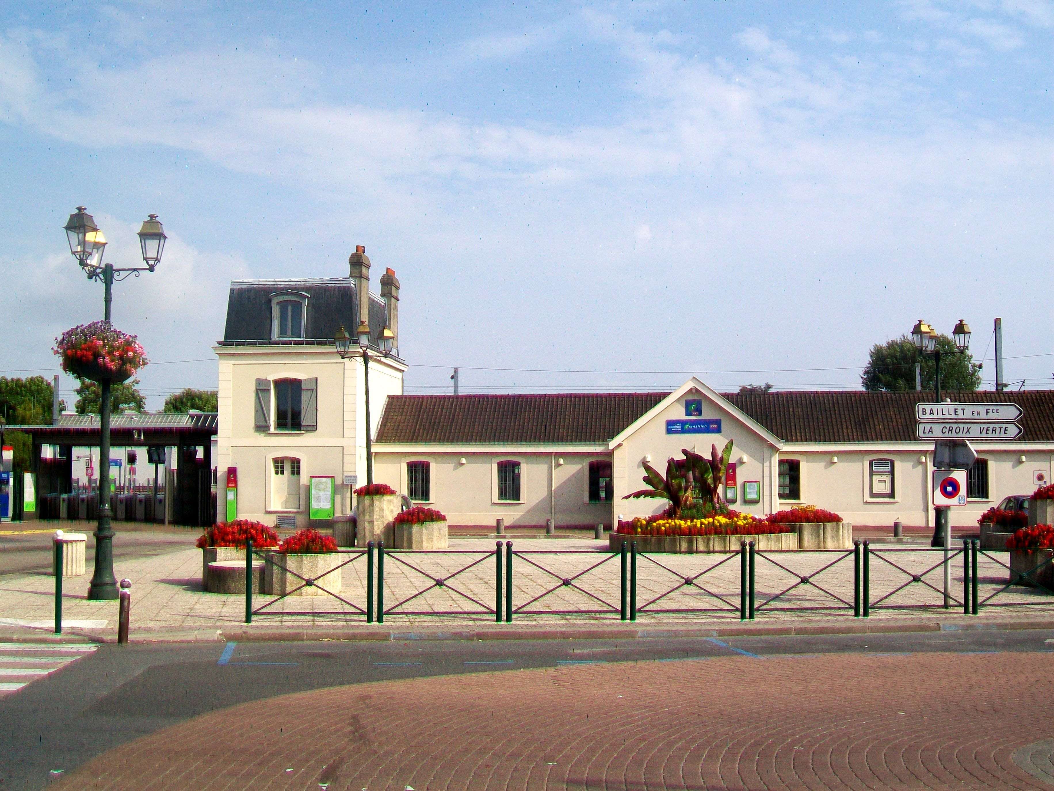 La place de la gare et le bâtiment-voyageurs.